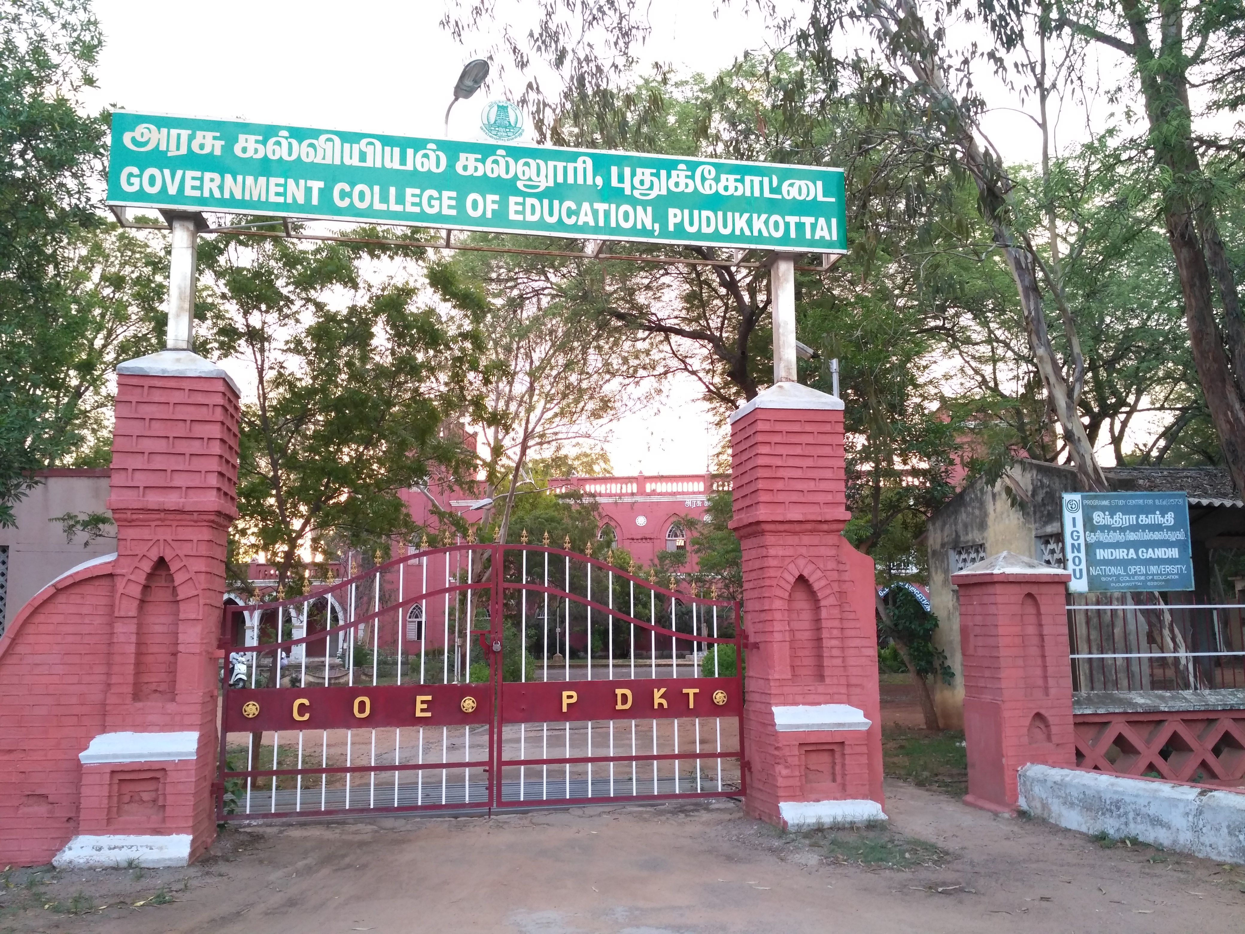 அரசு கல்வியியல் கல்லூரி, புதுக்கோட்டை